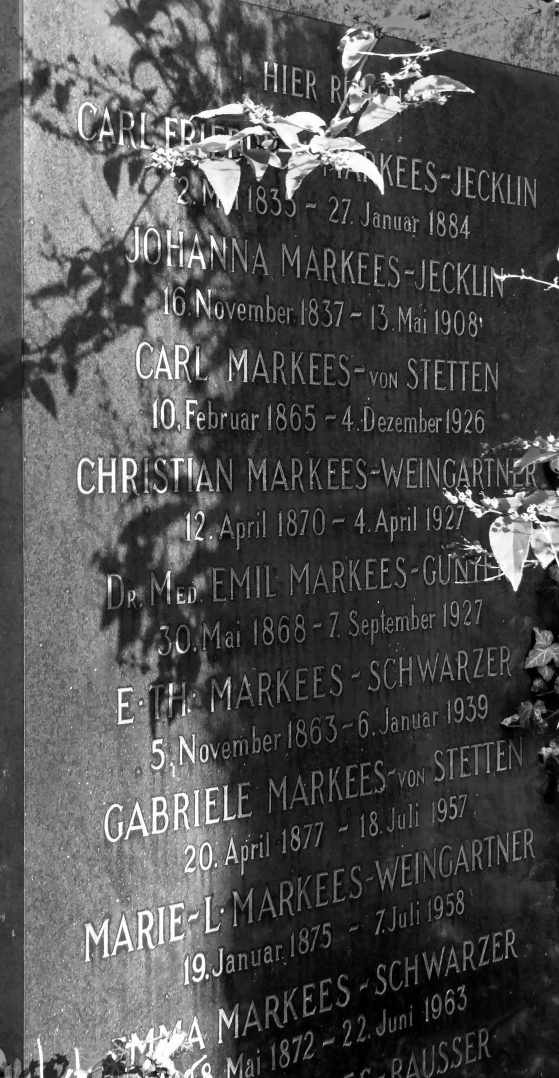 Ernst Thomas Markees-Schwarzer (1863–1939) Pianist, Komponist, Musikpädagoge, Musikkritiker, Grab auf dem Friedhof Wolfgottesacker, Basel